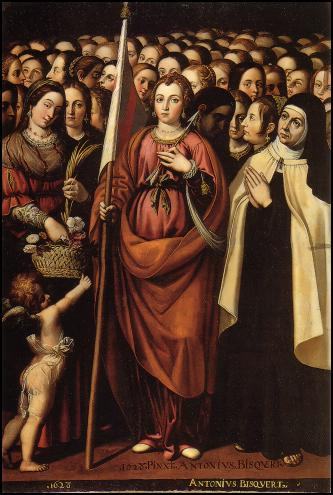 Santa Úrsula, santa Tersa de Jesús y santas, catedral de Teruel, capilla de la Virgen de los Desamparados.